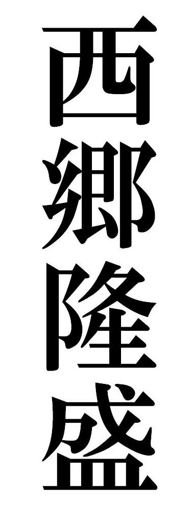 Kanjis for Saigo Takamori